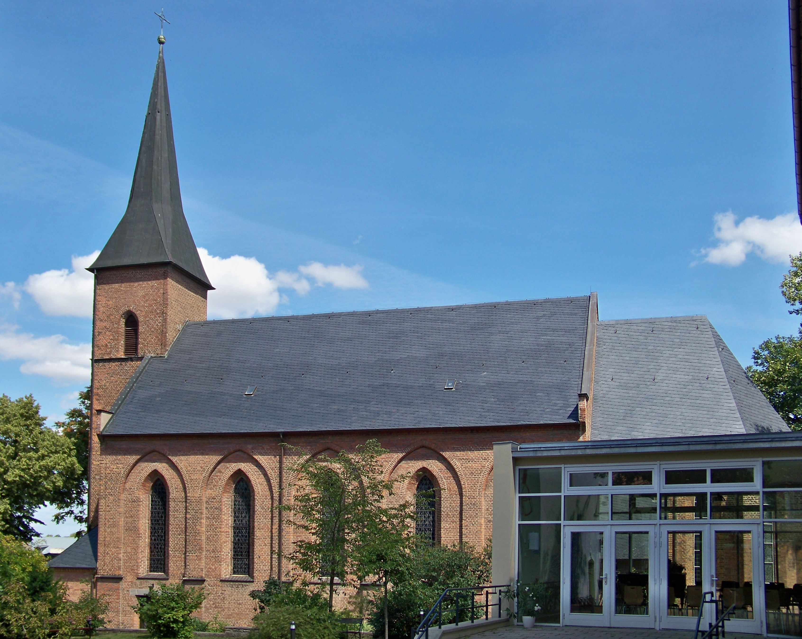 Katholische Kirche St. Bonifatius in Bernburg (Saale)